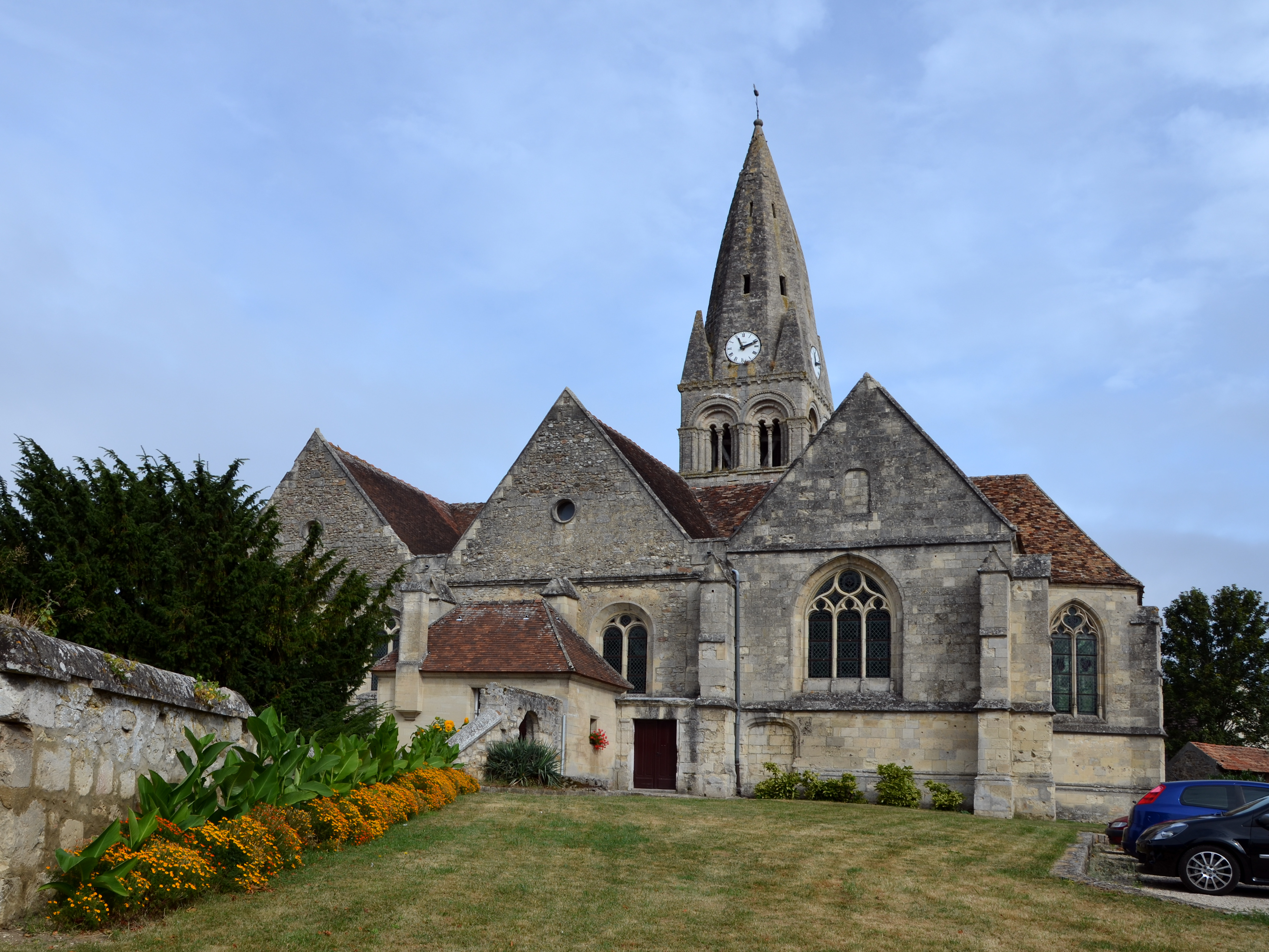 Église Ste Geneviève à Marolles, Oise, Picardie, France